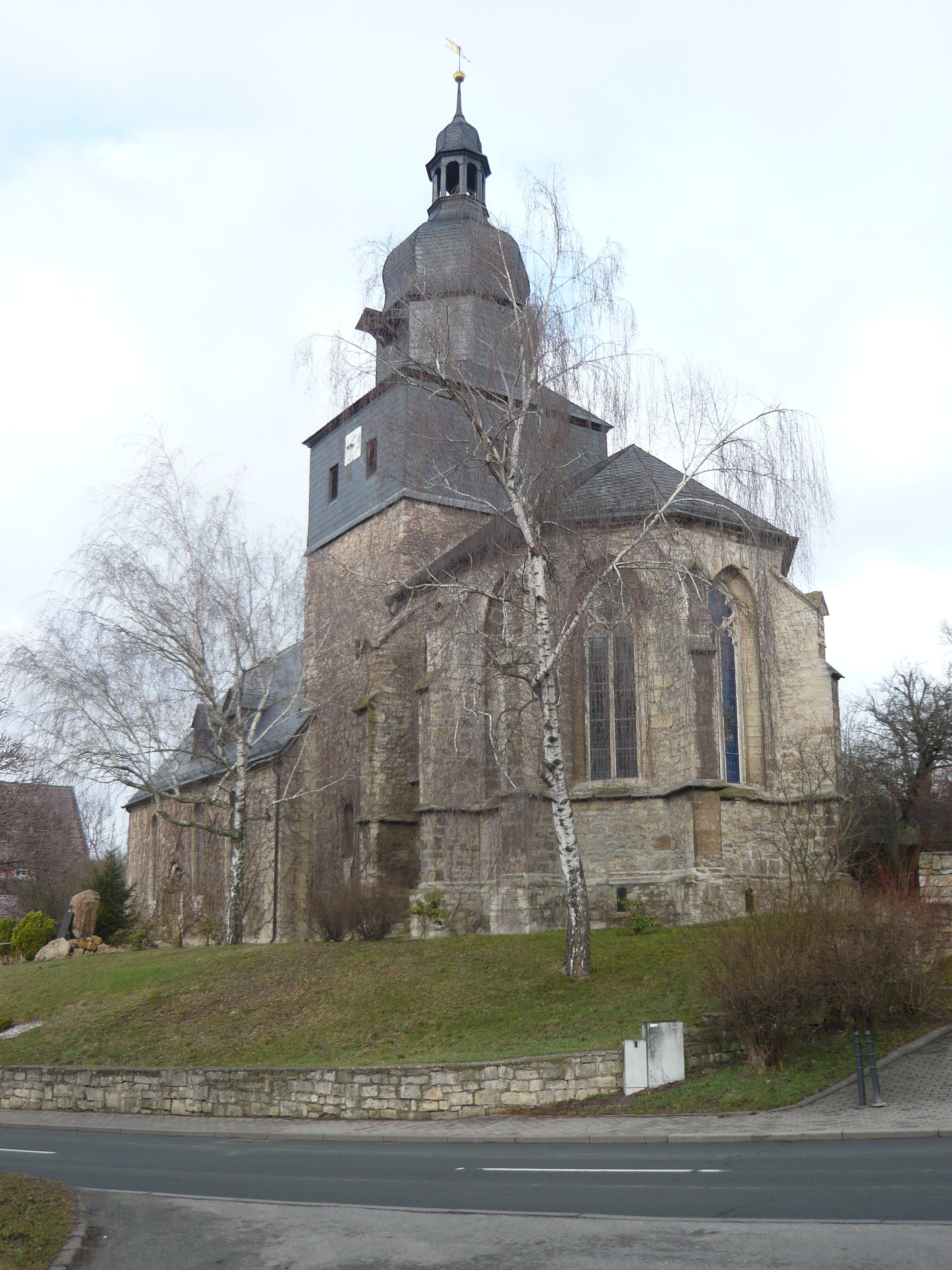 2011 in Utenbach